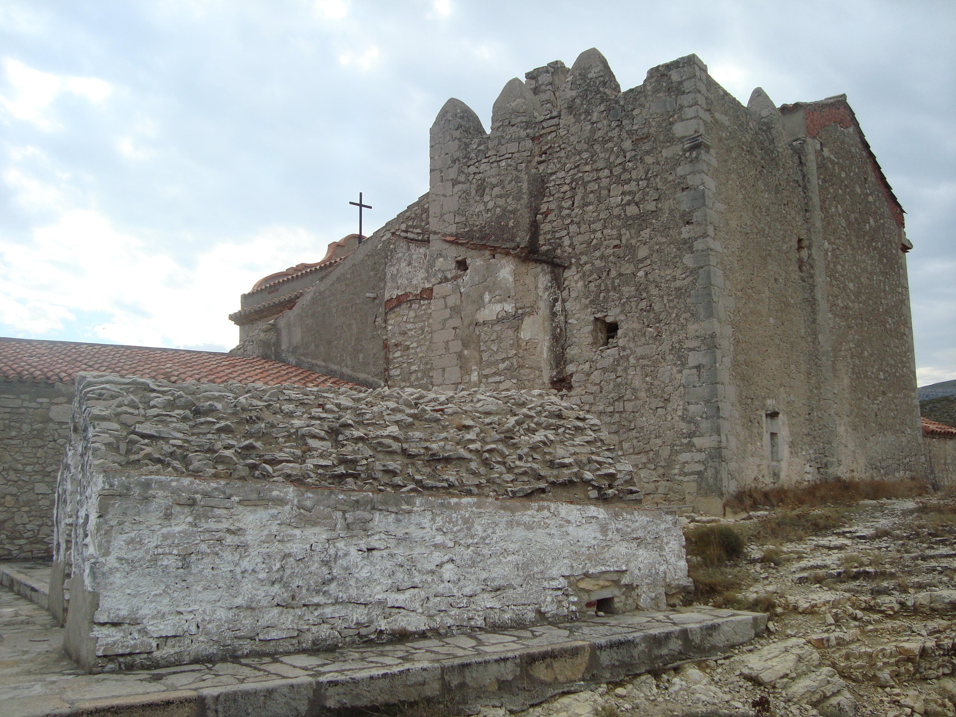 Torre de Sant Marc (Xert) 03.052-004.